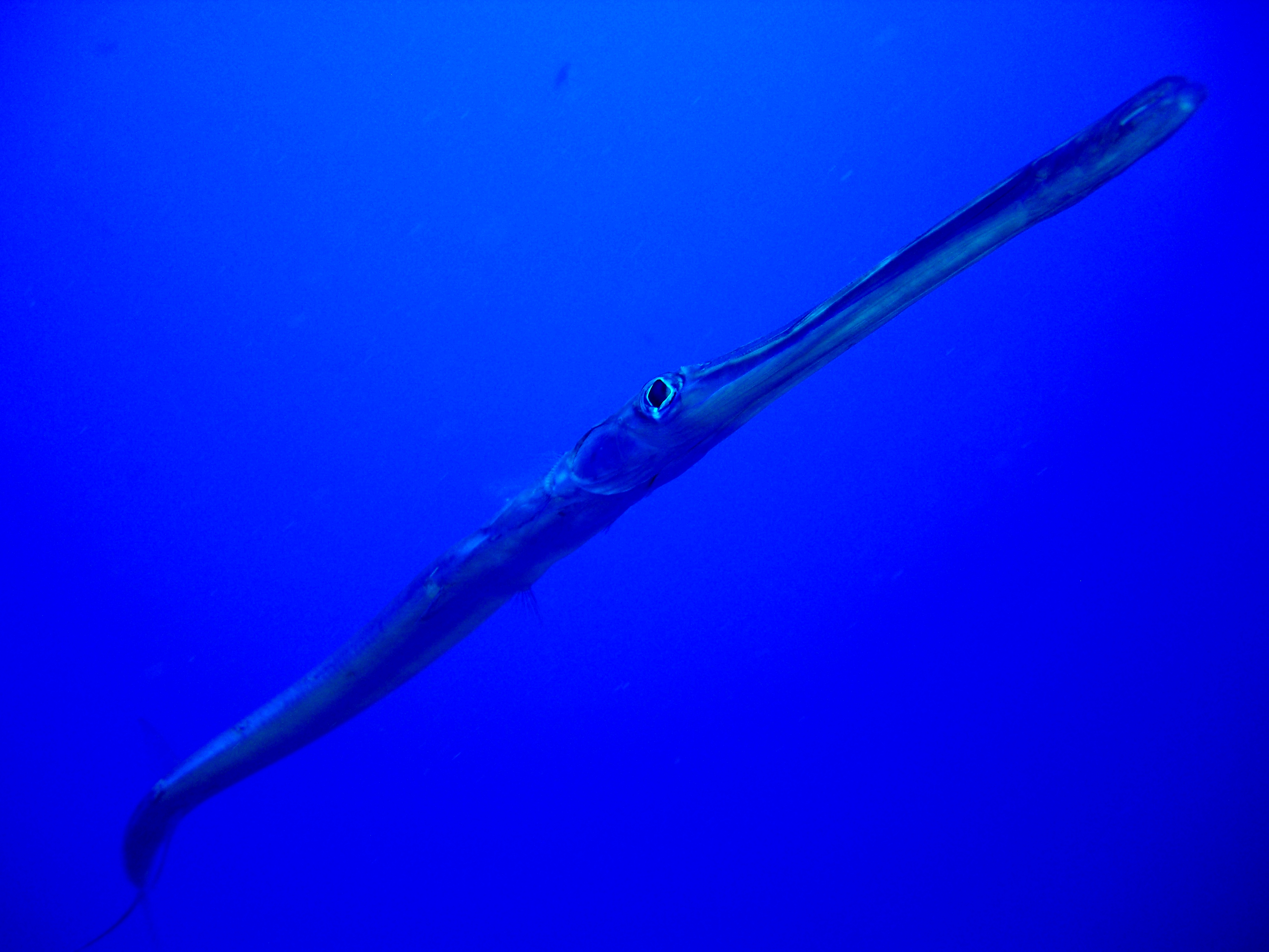 Fistularia